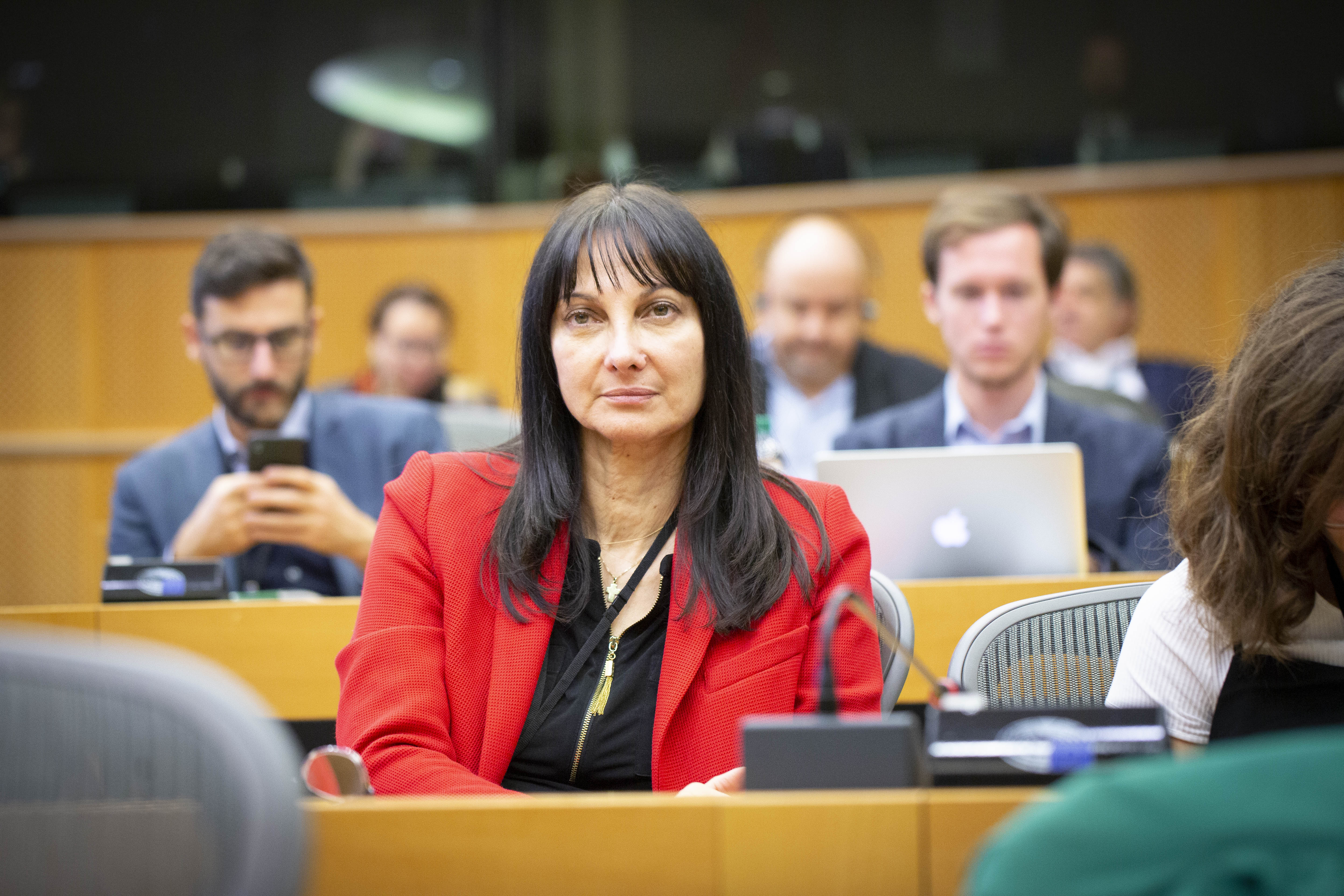 Elena Kountoura